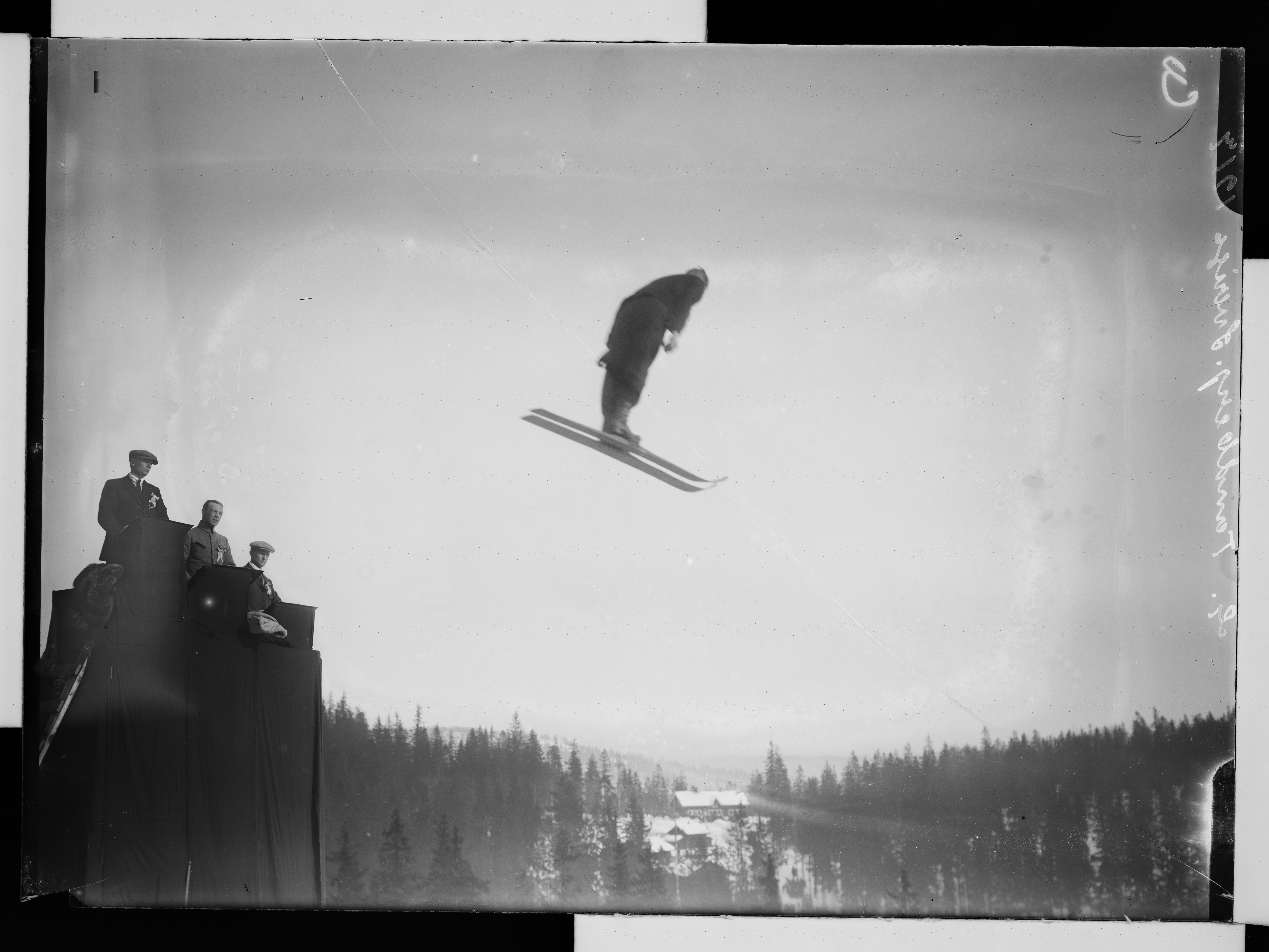 Bildet er hentet fra Nasjonalbibliotekets bildesamling. Anmerkninger til bildet var: Påskrift eske: Skiplater 1917 Påskrift negativ: G. Tandberg. Sverige 1917